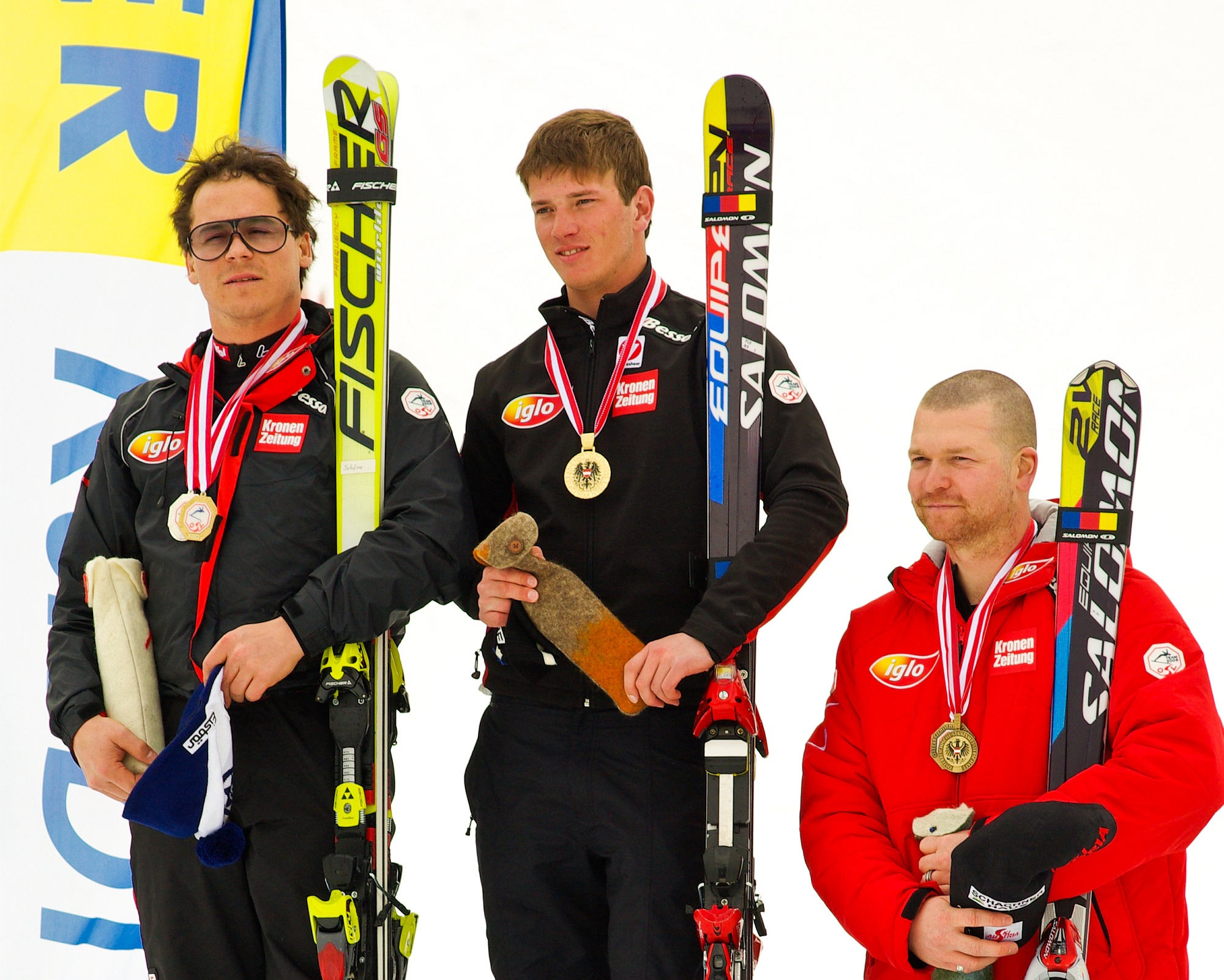 Die Sieger des Super-G der Österreichischen Alpinen Skimeisterschaften 2008: 1. Platz: Florian Scheiber (mitte) und Rainer Schönfelder (links), 3. Platz: Klaus Kröll (rechts)